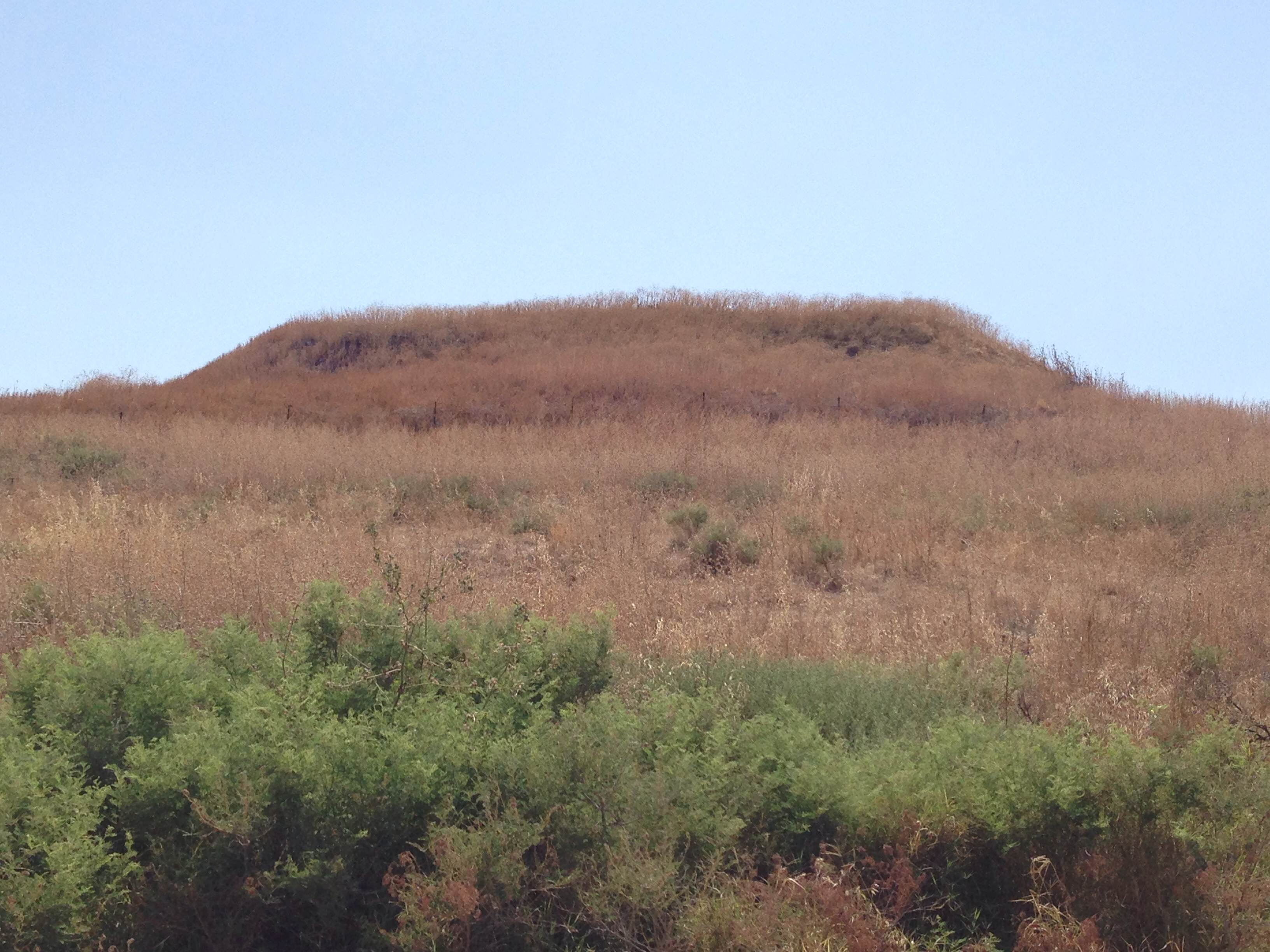 תמונה של תל שלם לידת קיבוץ טירת צבי